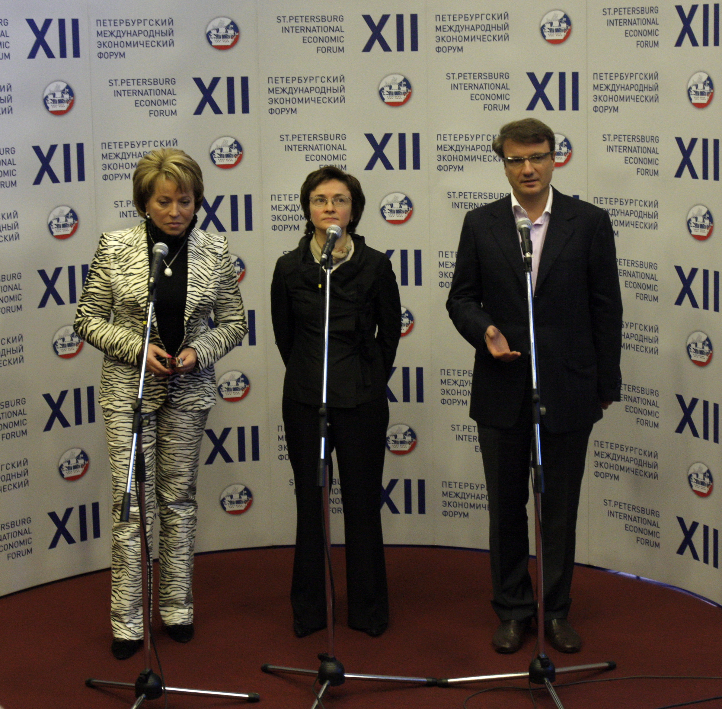 Пресс-подход по итогам заседания оргкомитета по подготовке к XII ПМЭФ.